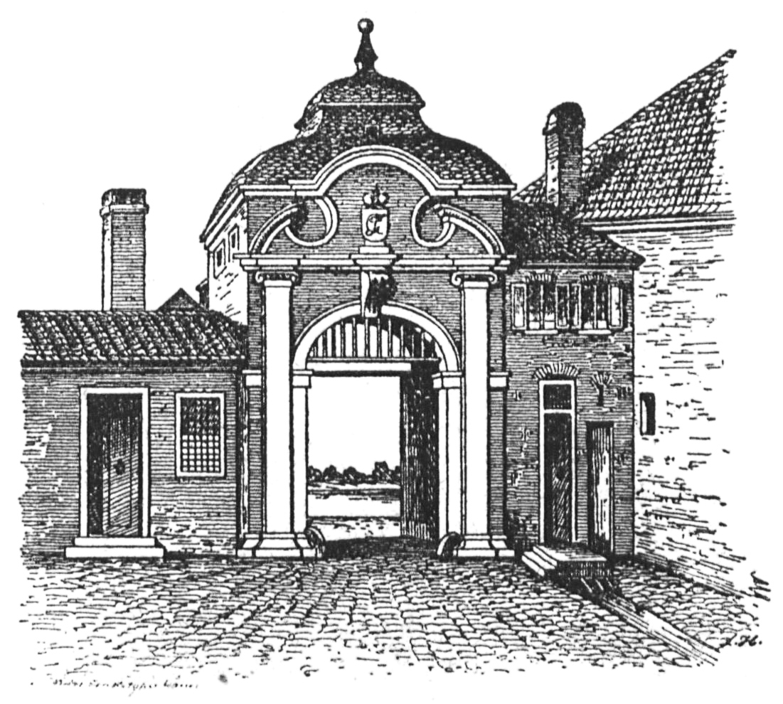 Rheintor in Düsseldorf, vor 1831